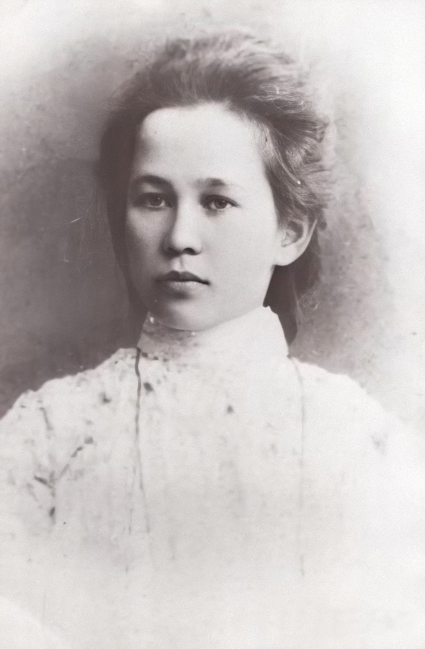 Чӑвашла: чăваш халăхĕн наци ирĕклĕхĕн юхăмĕн хастар пайташĕ, журналист. Шуррисем Хусана илсен, унта "Хыпар" хаçата редакциленĕ.